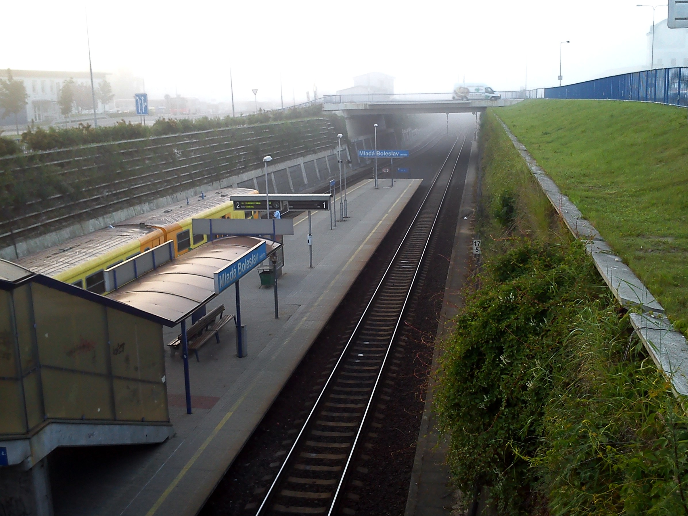 Železniční stanice Mladá Boleslav město